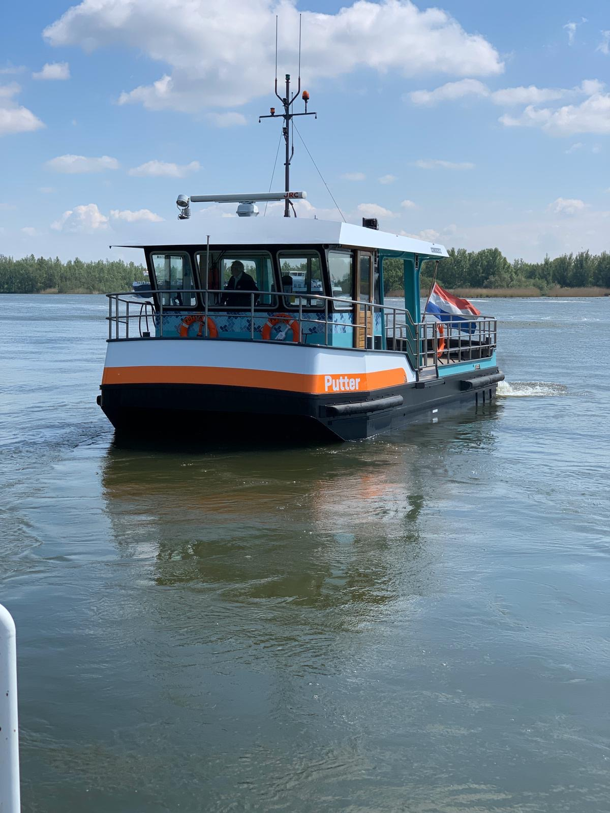 Veer Putter